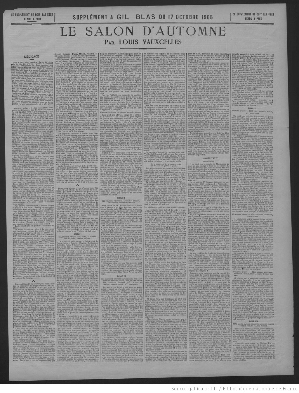 Titre : Gil Blas / dir. A. Dumont Éditeur : [s.n.] (Paris) Date d'édition : 1905-10-17 Contributeur : Dumont, Auguste (publiciste). Directeur de publication Contributeur : Gugenheim, Eugène (1857-1921). Directeur de publication Contributeur : Mortier, Pierre (1882-1946). Directeur de publication Type : texte Type : publication en série imprimée Langue : Français Langue : language.label.français Format : application/pdf Format : Nombre total de vues : 53031 Description : 1905/10/17 (A27,N9500). Droits : domaine public Identifiant : ark:/12148/bpt6k7522165g Source : Bibliothèque nationale de France, département Droit, économie, politique, JOD-209 Relation : Relation : Provenance : Bibliothèque nationale de France Date de mise en ligne : 27/08/2012